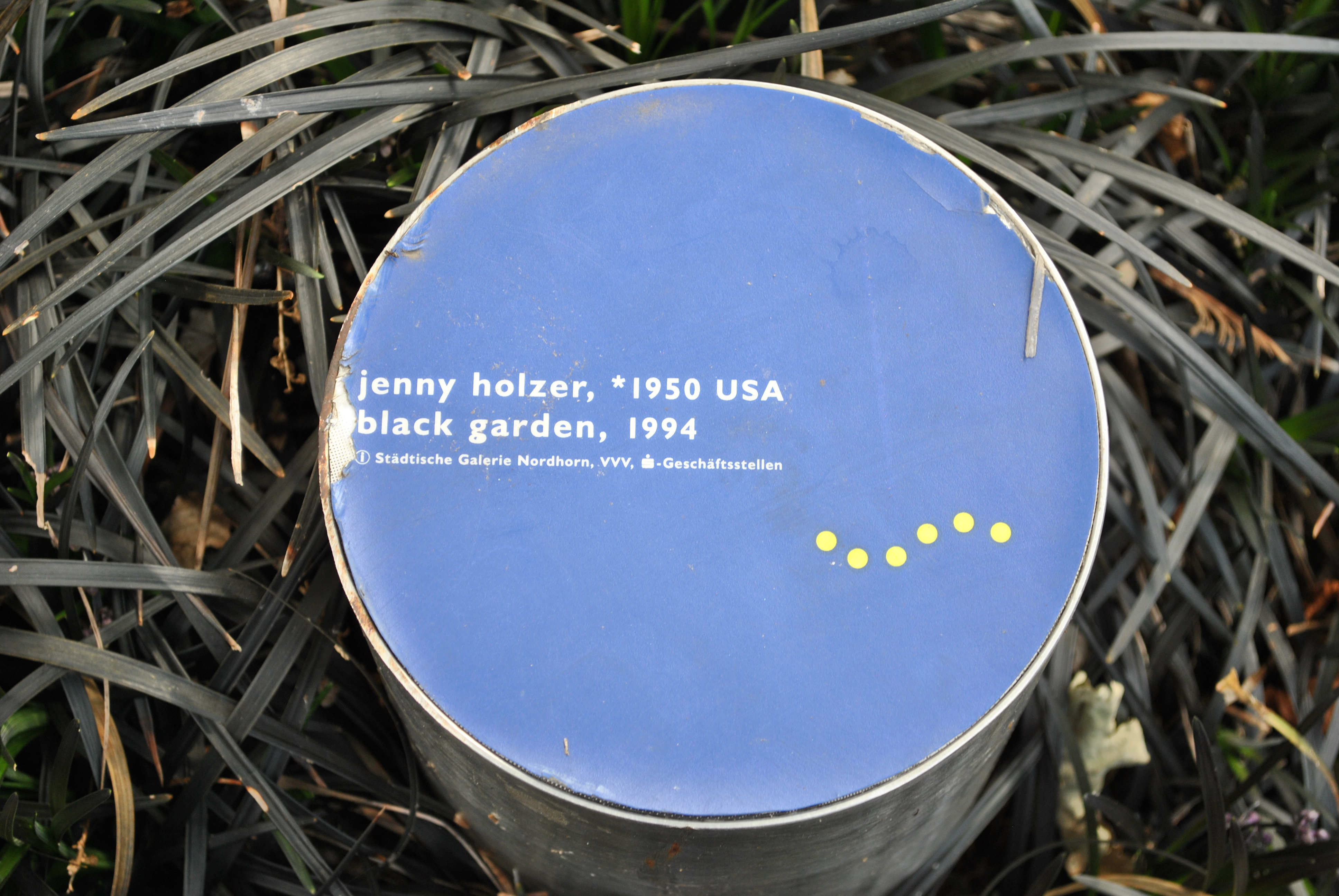 Schwarzer Garten in Nordhorn